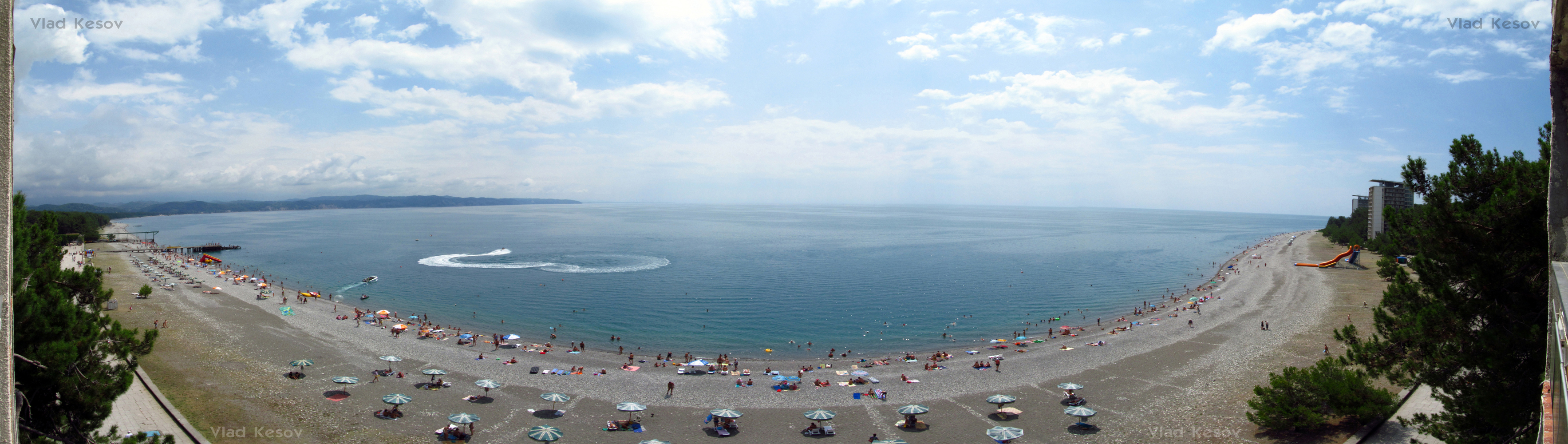 Панорамный вид из пансионата «Бзыбь».